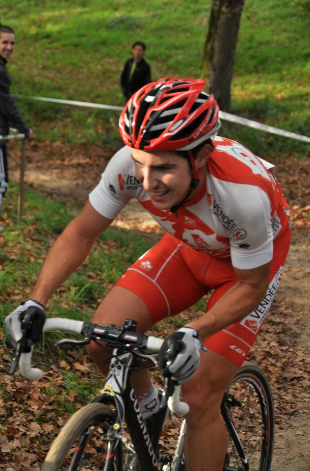 Angelo Tulik en 2011